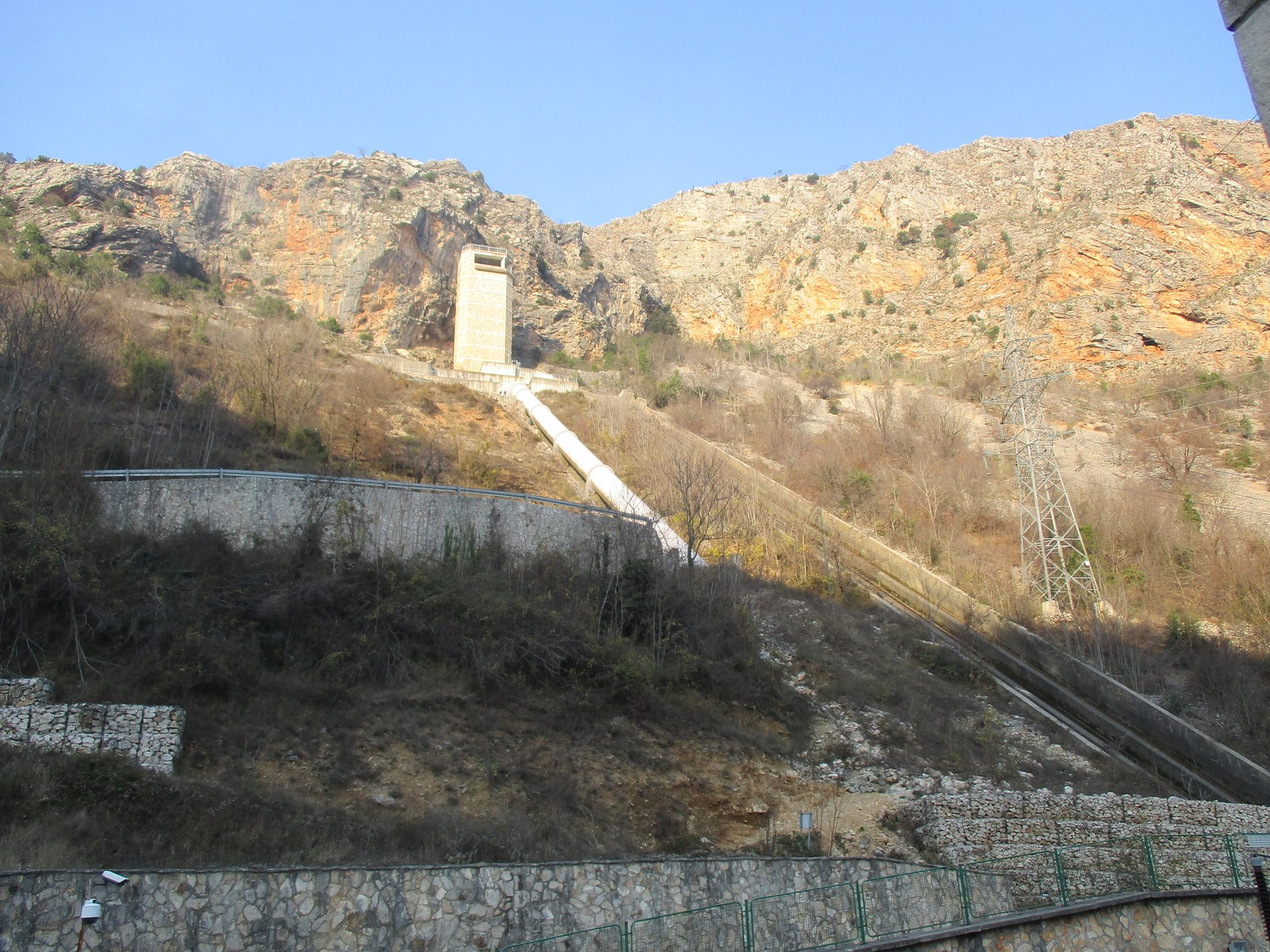 Tlačni cjevovod na Hidroelektrani Peć Mlini, Bosna i Hercegovina